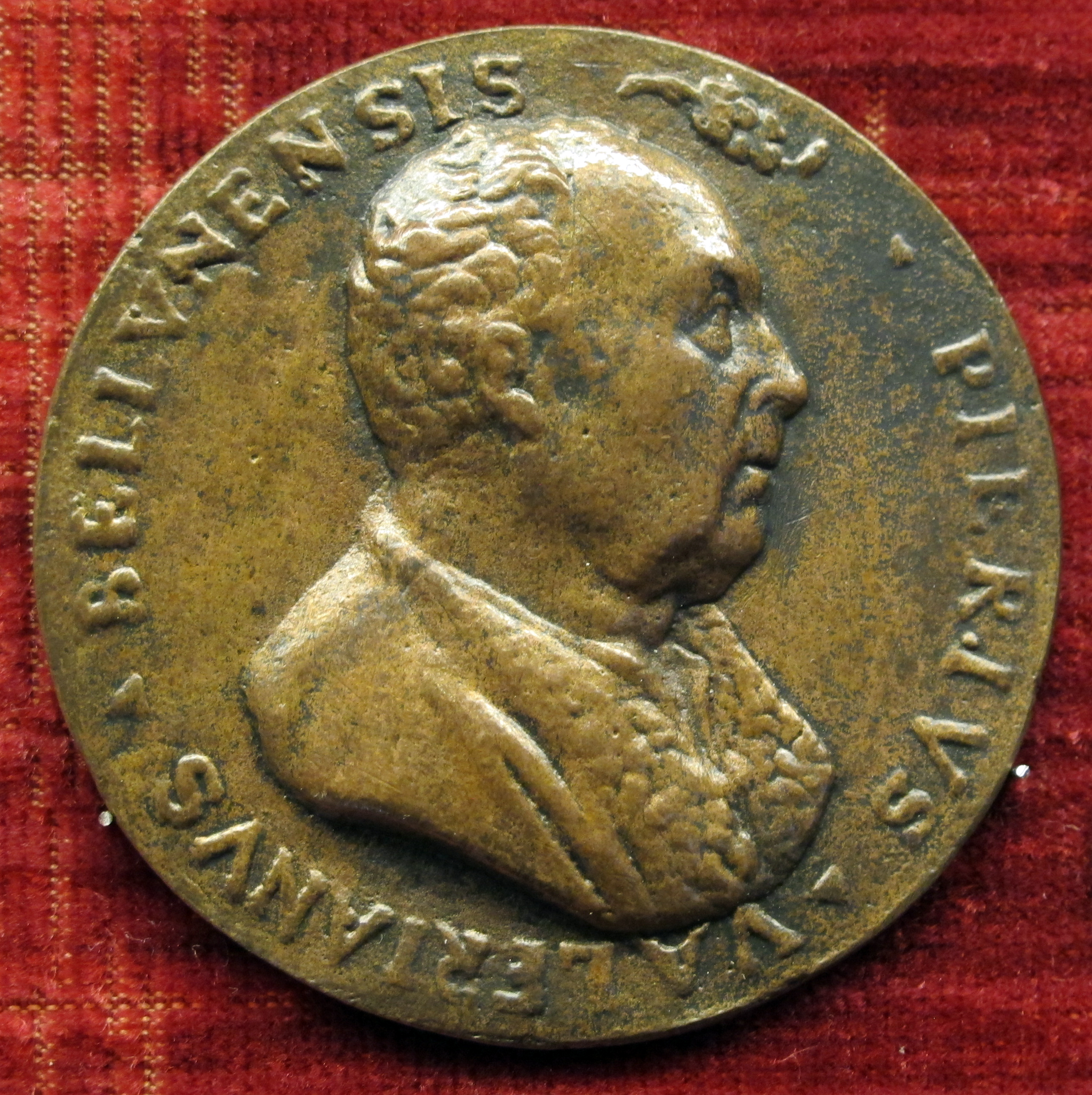 Pierio Valeriano (1477-1558), medaglia, vedi titolo